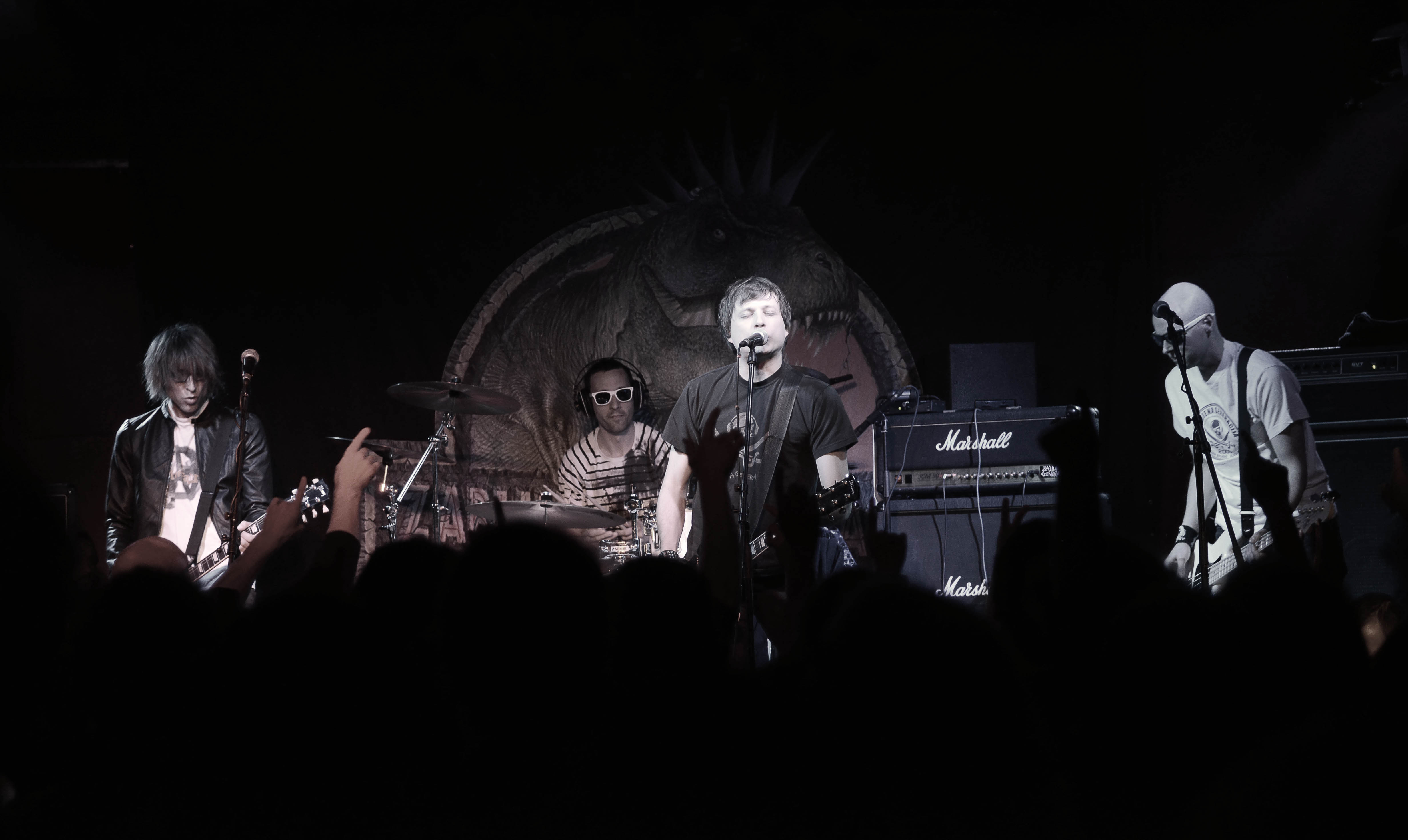 Zablujena generacija (2008, Orto bar)